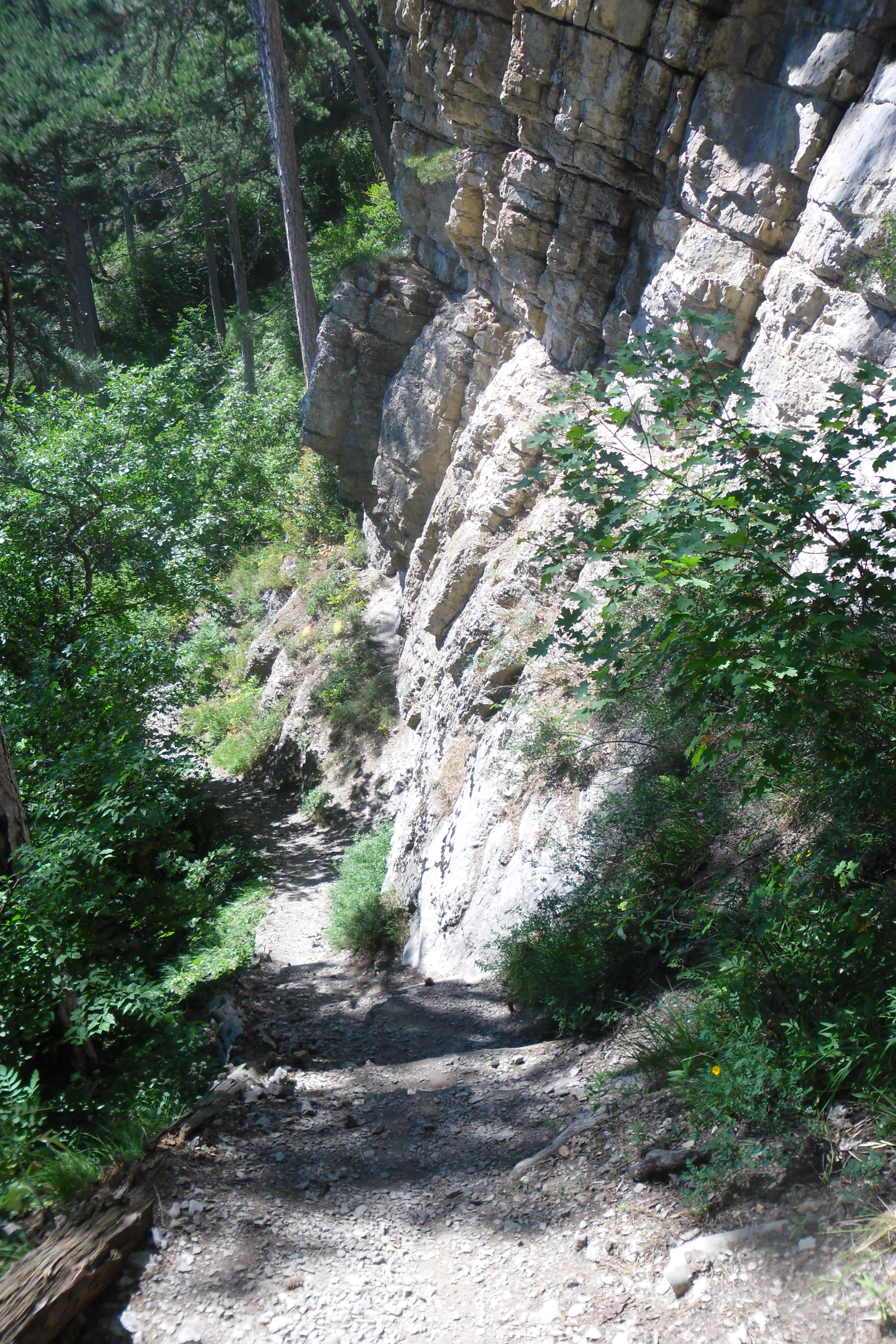 Фото